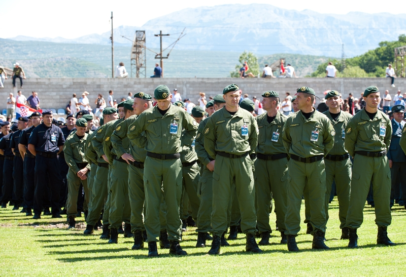 16. obljetnica vojnoredarstvene operacije Oluja u Kninu